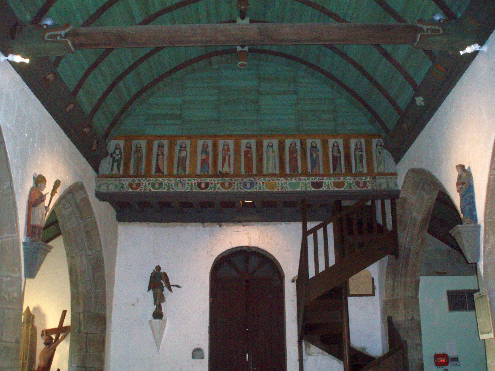 Fonds de la nef.